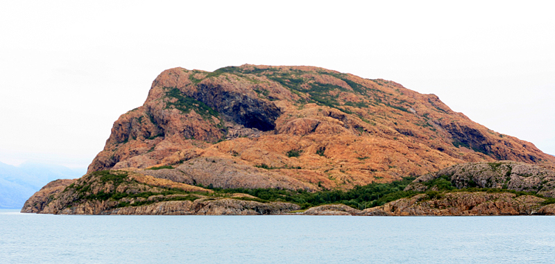 Rødøya, Alstahaug, Nordland, Norway.